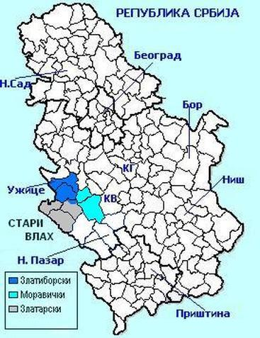 Област Стари Влах, Подељена на три Става Влаха Златиборски (обухата планину Златибор и Ужице, Златарски обухвата планину Златар (Општине Нову Варош и Прибој и Пријепоље) напомена у Златарски Стари Влах не улазе златиборска села Драглица, Негбина, Бела Река и Јасеново која припадају планини Златибору и самим тим улазе у златиборски Стари Влах, који је ишао јужном границом Општине Чајетина, реком Увац, али су 1958 године ова четири села изузета управно из Општине Чајетина и припојена управно Новој Вароши, мада по свему и припадају планини Златибор а самим тим и управно Општини Чајетина. Моравички Стари Влах обухвара слив реке Моравице